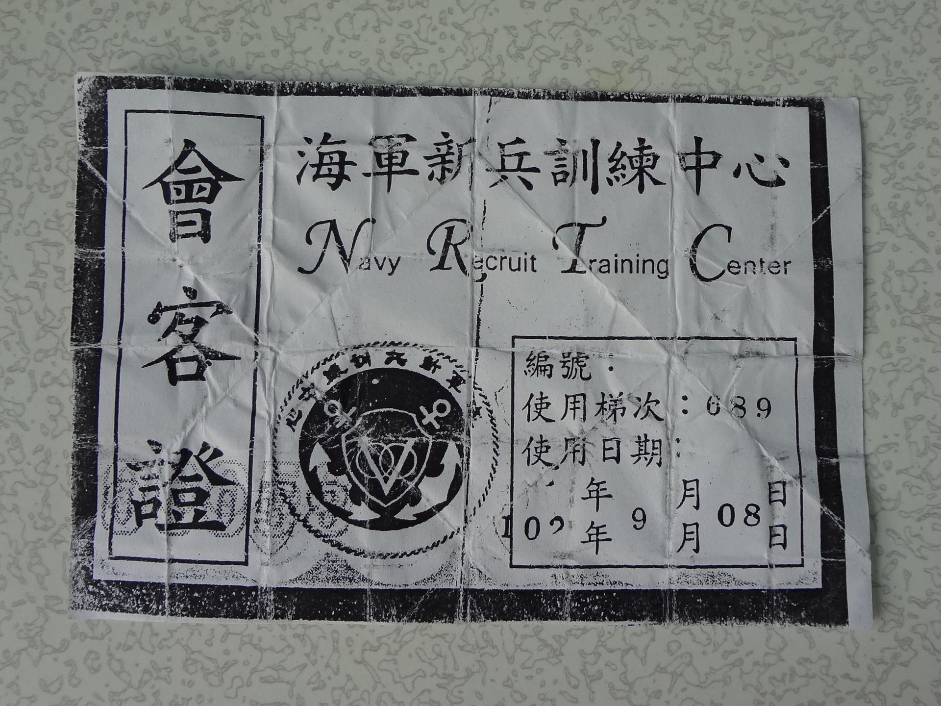 中華民國海軍新兵訓練中心689梯次新兵家屬專用會客證，下方印海軍新兵訓練中心徽章。